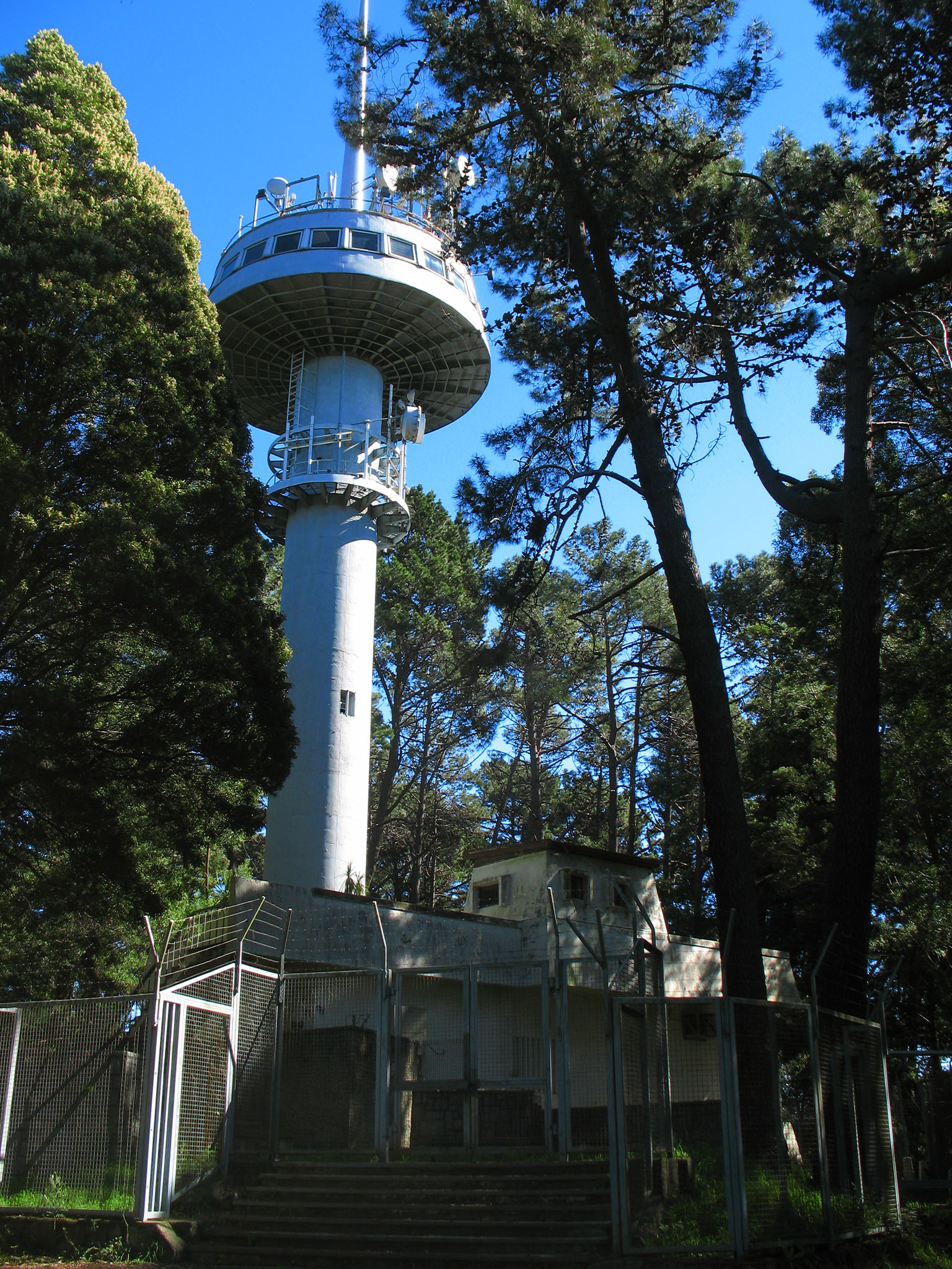 Concepcion, cerro Caracol